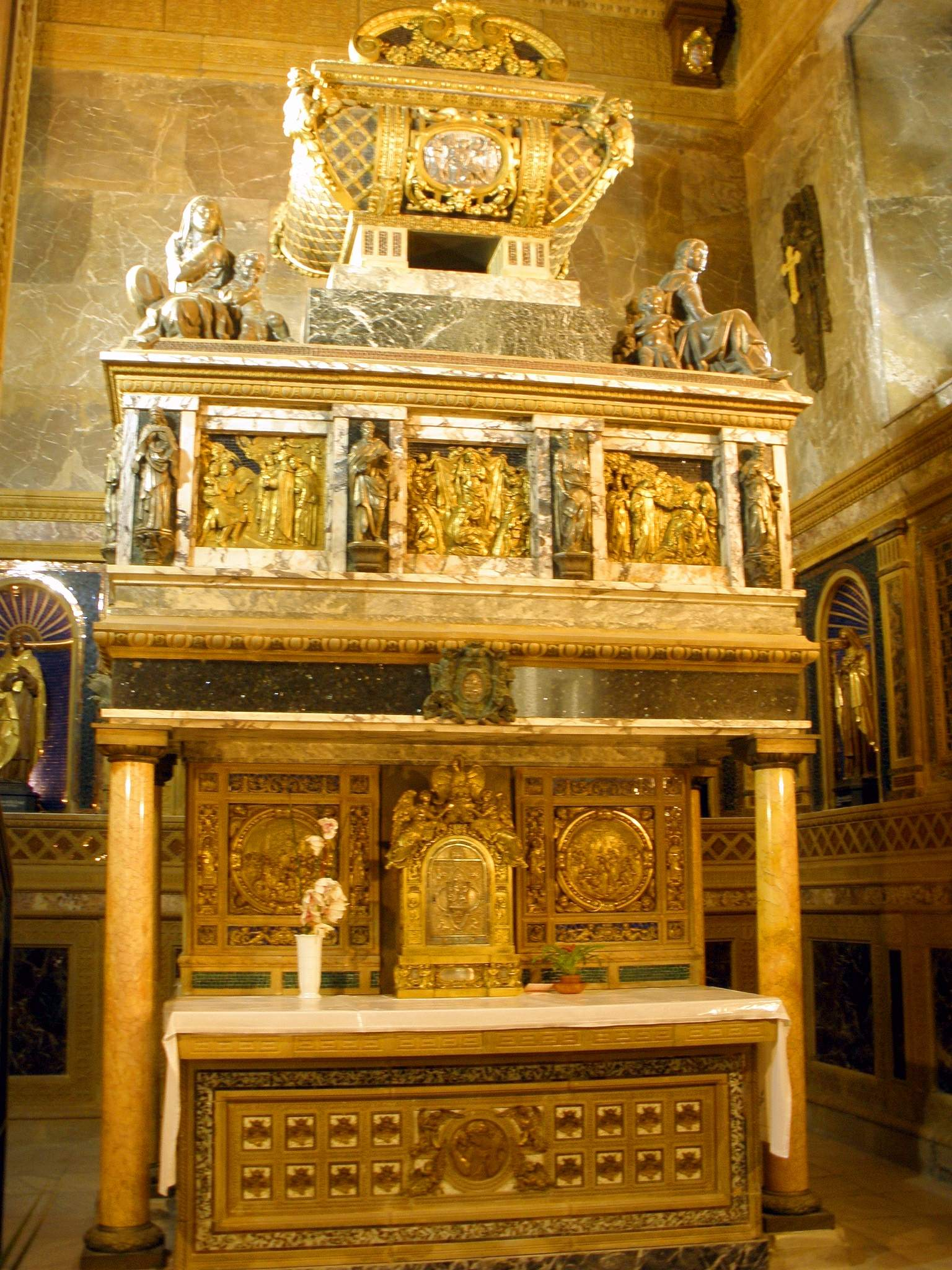 Segovia - Convento de los Carmelitas Descalzos, Capilla de San Juan de la Cruz, Sepulcro del santo